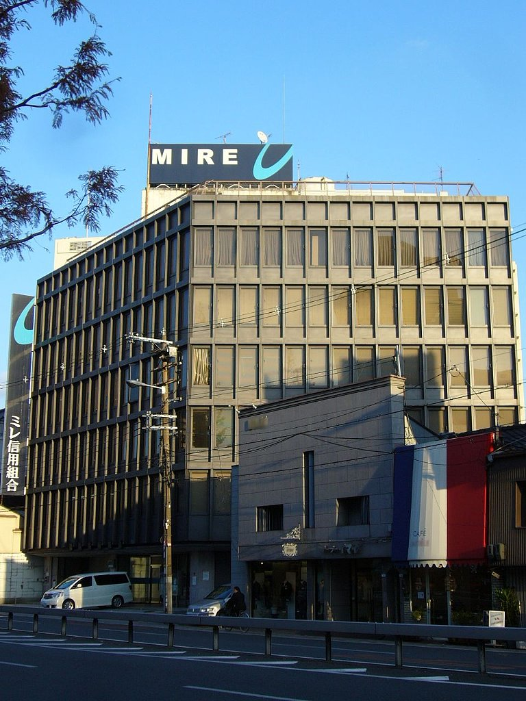 ミレ信用組合本店